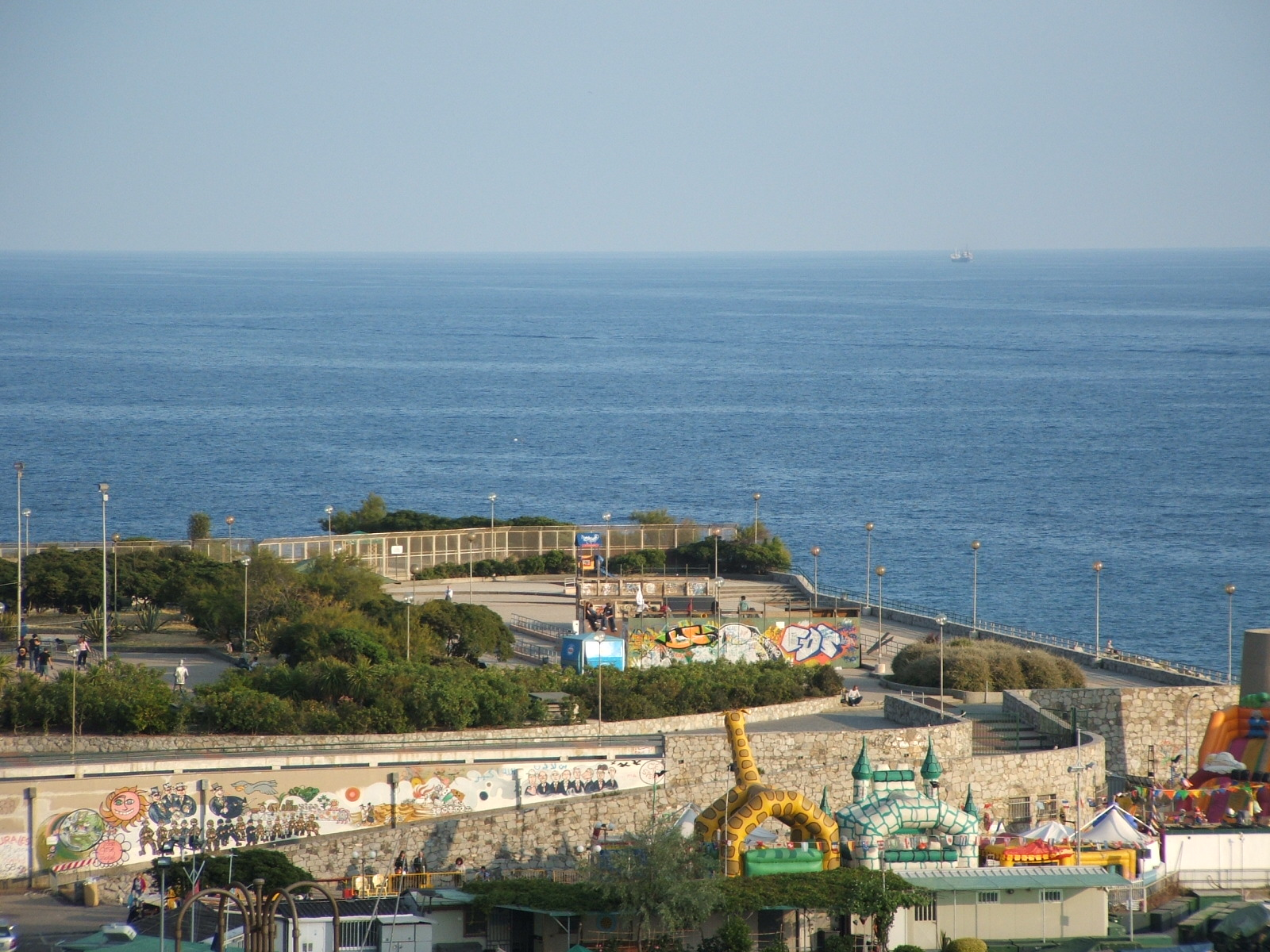 Immagine dal quartiere della Foce, Genova Giardini intitolati a Gilberto Govi